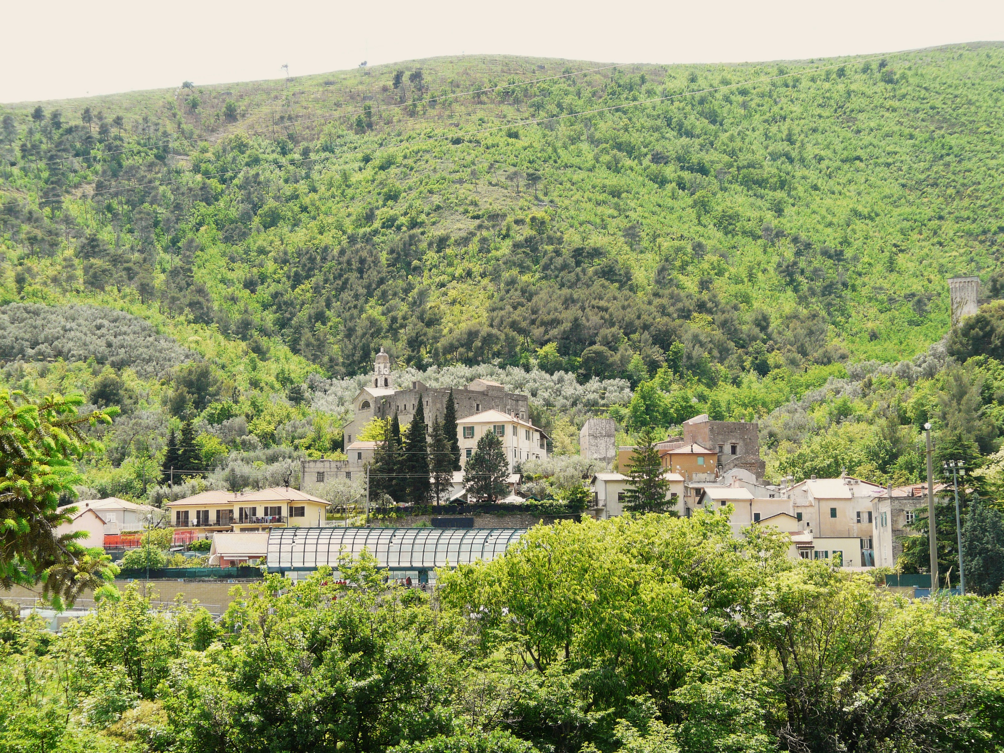 Frazione di Conscente, Cisano sul Neva, Liguria, Italia